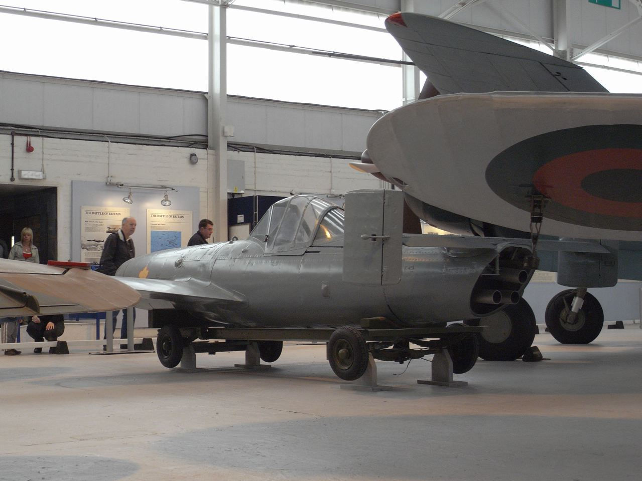 桜花11型の後部